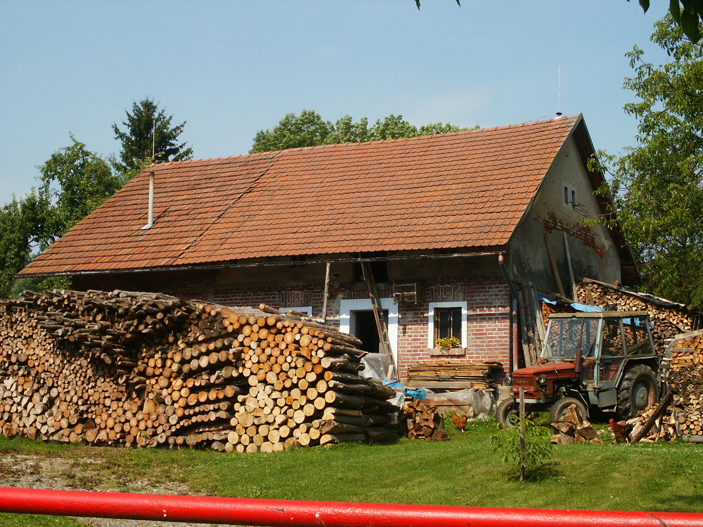 Plhov - dvůr a hosp. stavení u č.p. 3